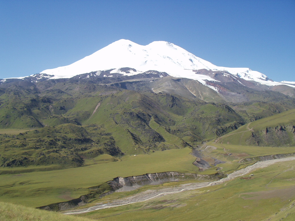 Северные склоны Эльбруса Къарачай-малкъар: Минги тауну шимал джаны, Джылы сууну тийреси